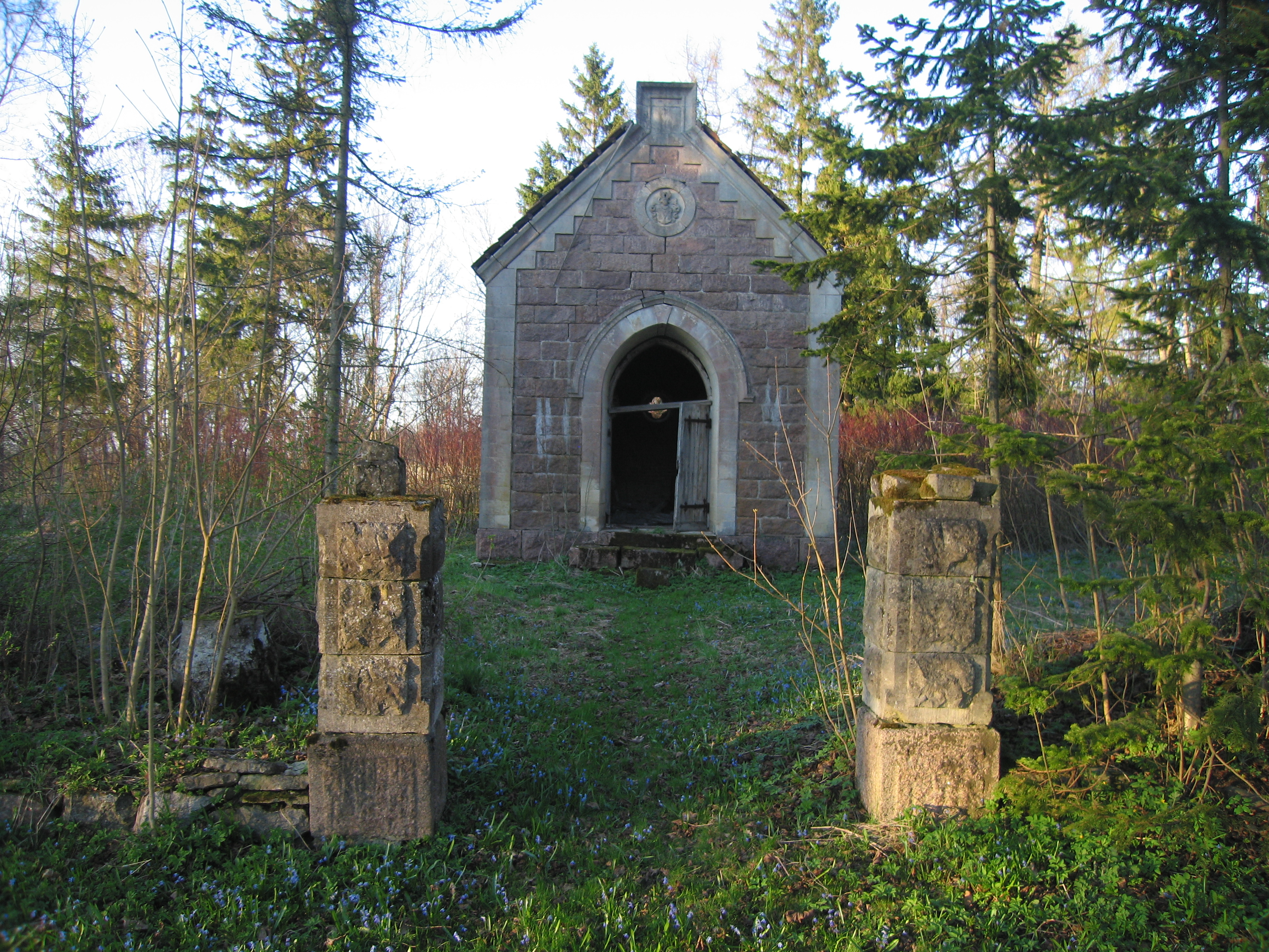 Kalmistu värav ja kabel kalmistul. Foto: Robert Treufeldt, 30. aprill 2016